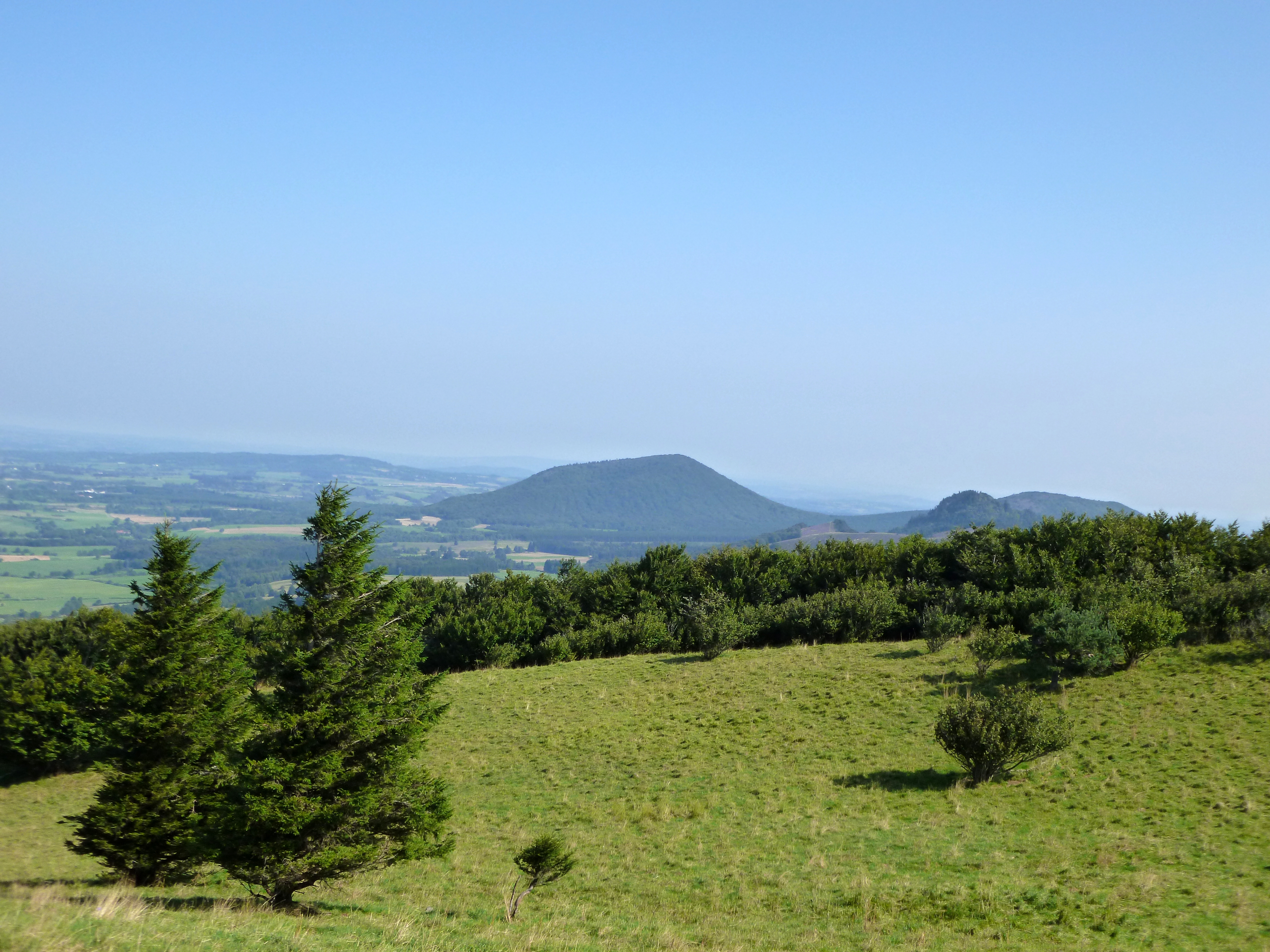 Du sommet du Puy de Côme, on aperçoit au fond le Puy de Louchadière (1 199m).